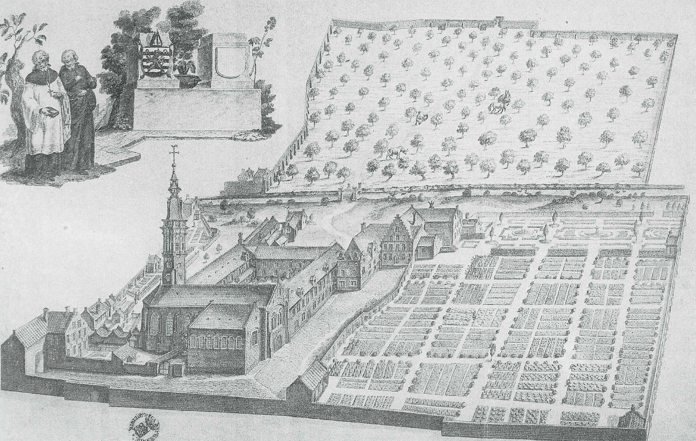 Algemeen zicht op de Eekhoutabdij - Brugge - België